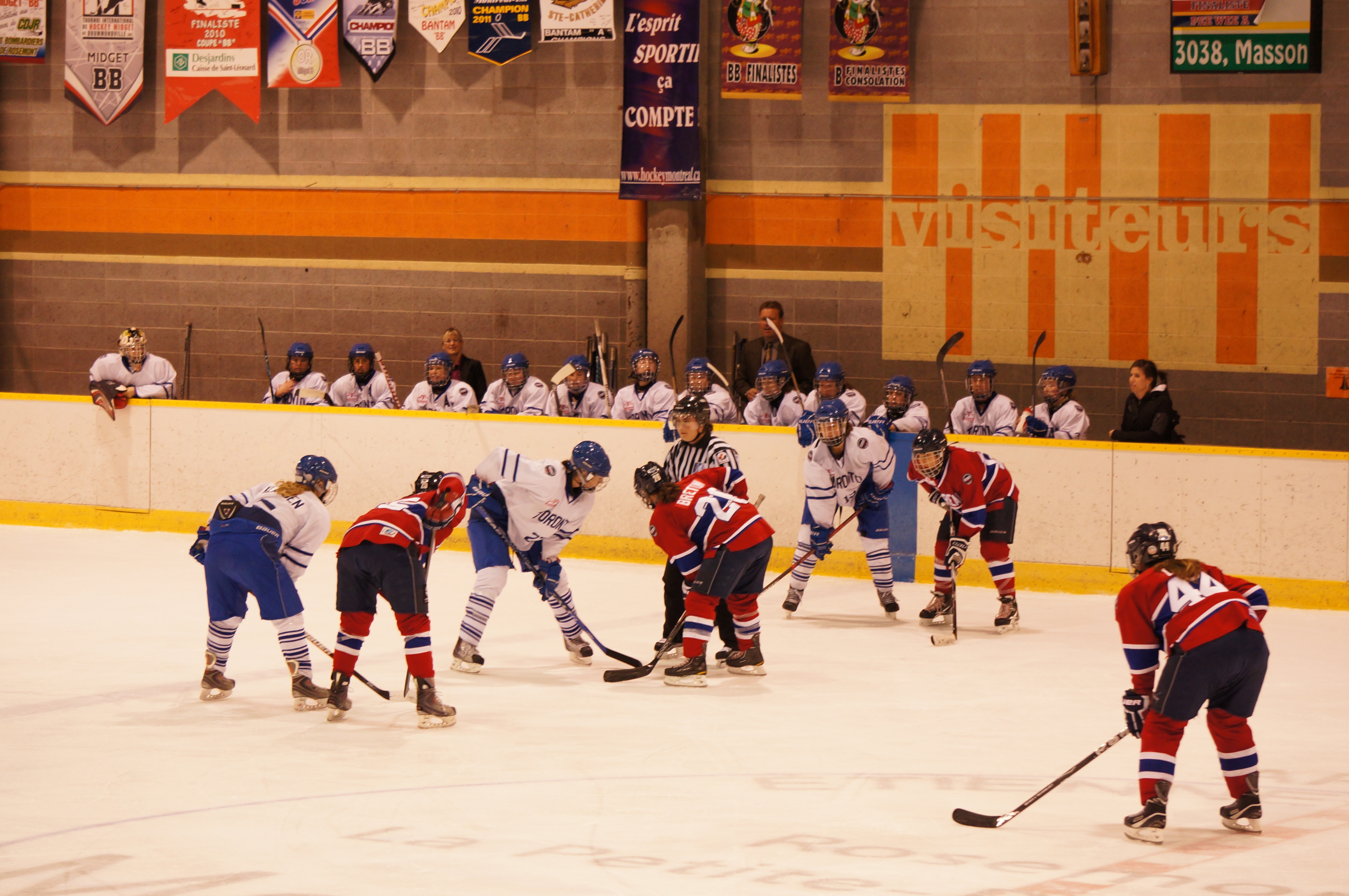 Hockey féminin